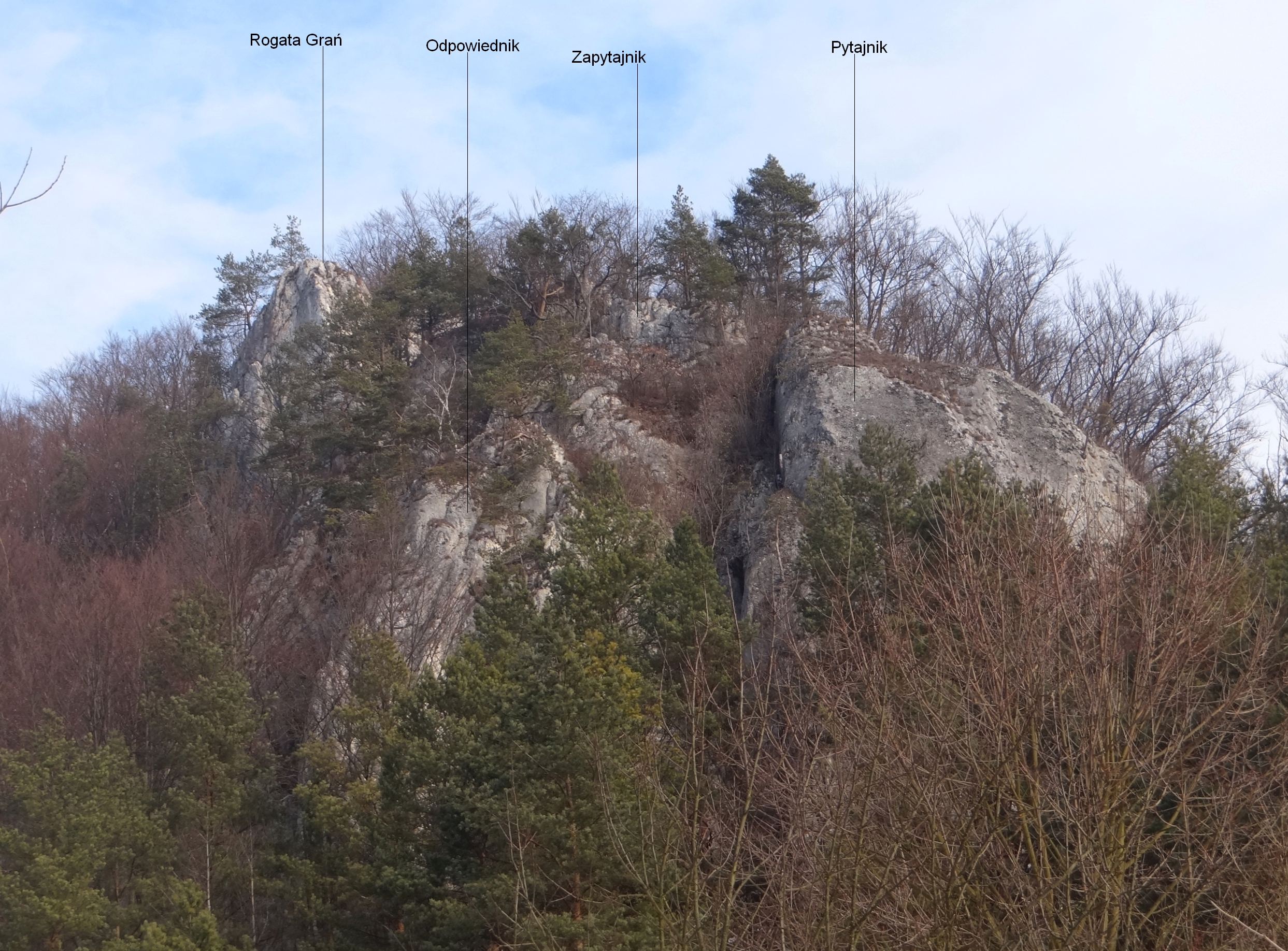 Brama Będkowska (zachodnia część)